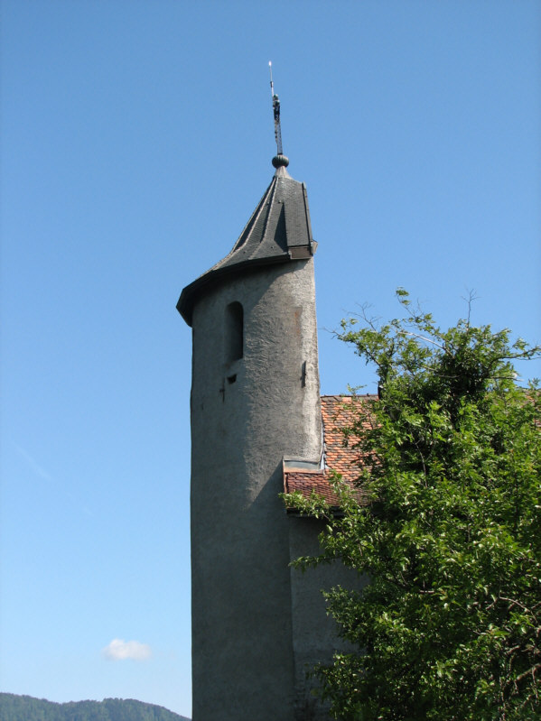 Demi-clocher de la chapelle, sur la colline des châteaux à Allinges (Haute-Savoie, France)